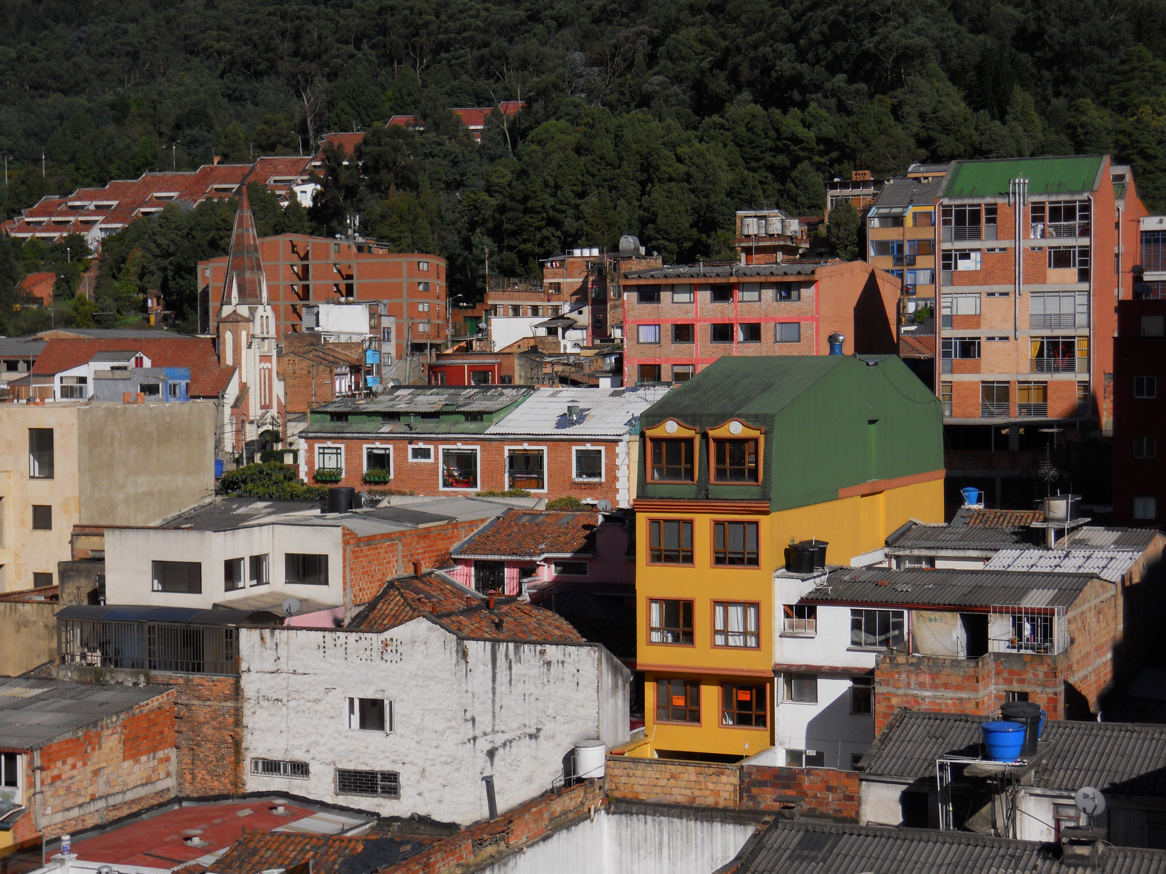 Barrio La Macarena entre calles 26 y 26 y carreras 3 y 4A.